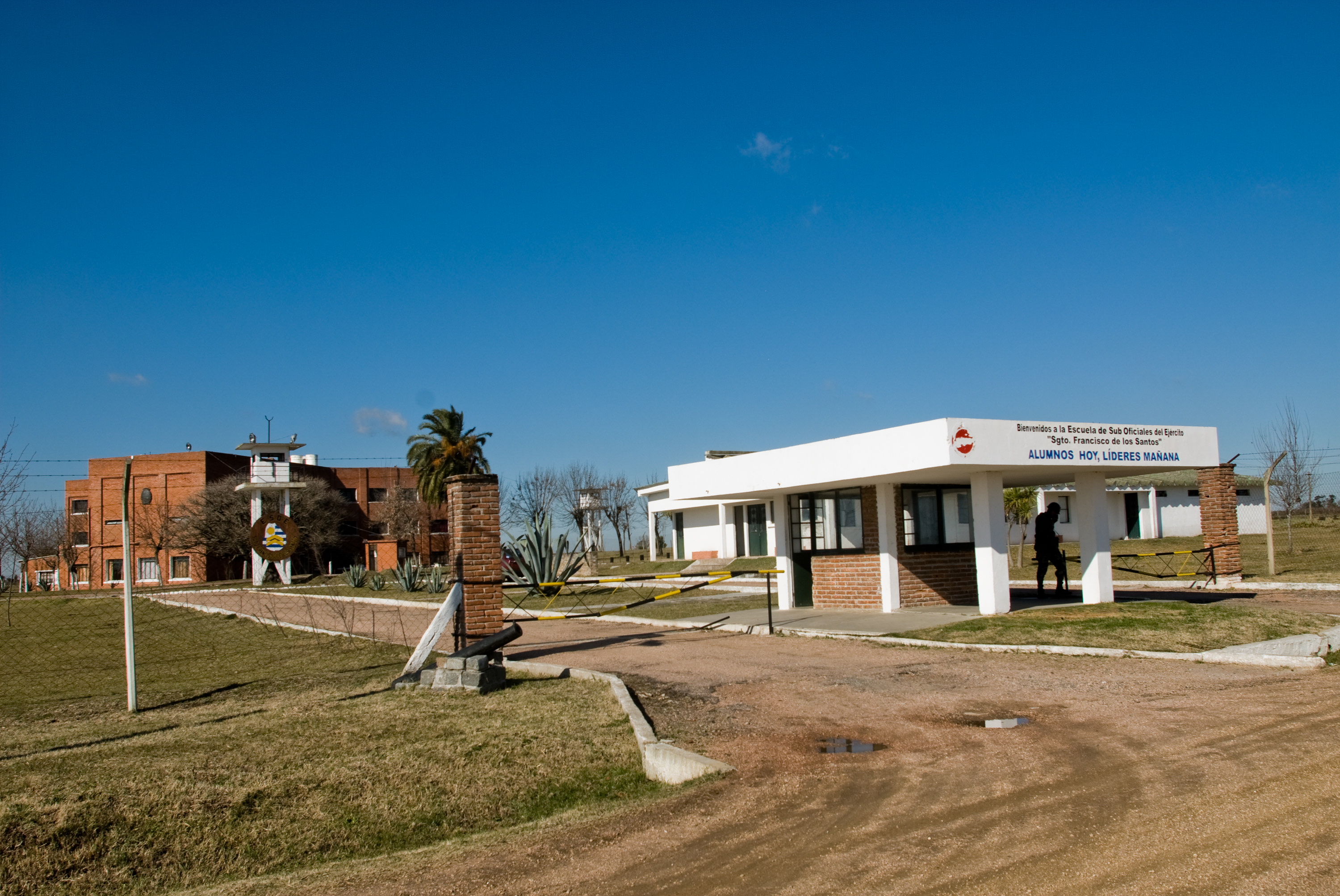 Fotografía de centro de detención durante la dictadura cívico militar en Uruguay tomada por Carlos Contrera y parte de la muestra Huellas de la Represión : Identificación de centros de detención del autoritarismo y la dictadura (1968-1985). Licenciado libremente por el Centro de Fotografía de Montevideo en el marco de la Editatón Wiki DDHH Uruguay 2018. y la colaboración GLAM de esa institución con Wikimedia Uruguay. Asunto Especifico: Penal de Punta de Rieles. Camino Dionisos entre Avda. Punta de Rieles y Camino Chacarita de los Padres. 11 de julio de 2007. Temas relacionados: Huellas de la represion Codigo de referencia: UY858 Numero de registro: FMCMRTECD Titulo del Fondo: Fondo Municipal Contemporaneo Titulo de Subfondo: Memoria de la Represion y del Terrorismo de Estado Titulo de Serie: Centros de detencion Fecha de registro: 11 de julio de 2007 Nombre del o de los productores: Centro Municipal de Fotografia Nombre del o de los autores: CONTRERA ORGAMBIDE Carlos Maria Tipo general y especifico de documento: fotografia, positivo Modalidad de ingreso: fotografia producida por un fotografo del CMDF Tecnica Fotografica: fotografia digital Soporte: magneto-opticoFormato: 3872 x 2592 pixeles a 8 bits por canal en espacio de color Adobe RGB (1998) Tipo de archivo: tiff sin compresion Tipo de imagen: Horizontal, Vertical Tono: policromo Tradicion documental: original Signatura Topografica: Modulo 5 Existencia: Maquina: Nikon D200 Lente: Nikkor ED 20-35 mm f 2.8, Nikkor ED 80-200 mm f 2.8, Nikkor ED 35-70 f 2.8 Estructura formal: Fecha de ingreso: Documento relacionado: Notas complementarias: Condiciones de acceso: libre para la consultaCondiciones de reproduccion: restringido